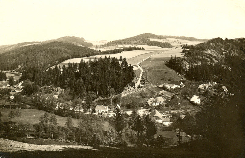 Celkový pohled na Chudobín od Bořiny v roce 1930.